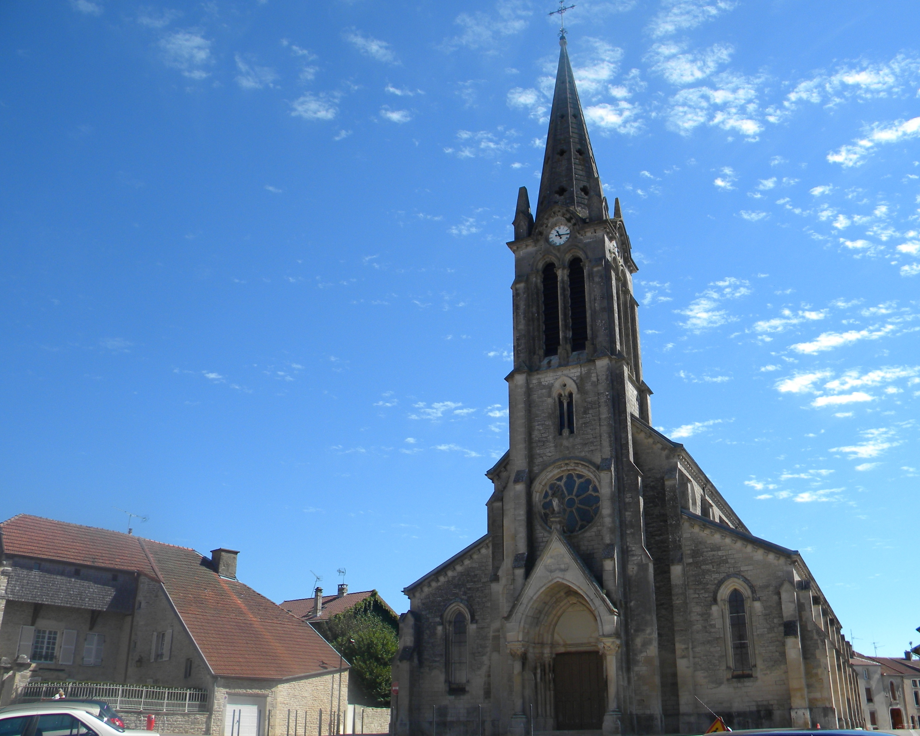 Eglise Saint Jean porte latine